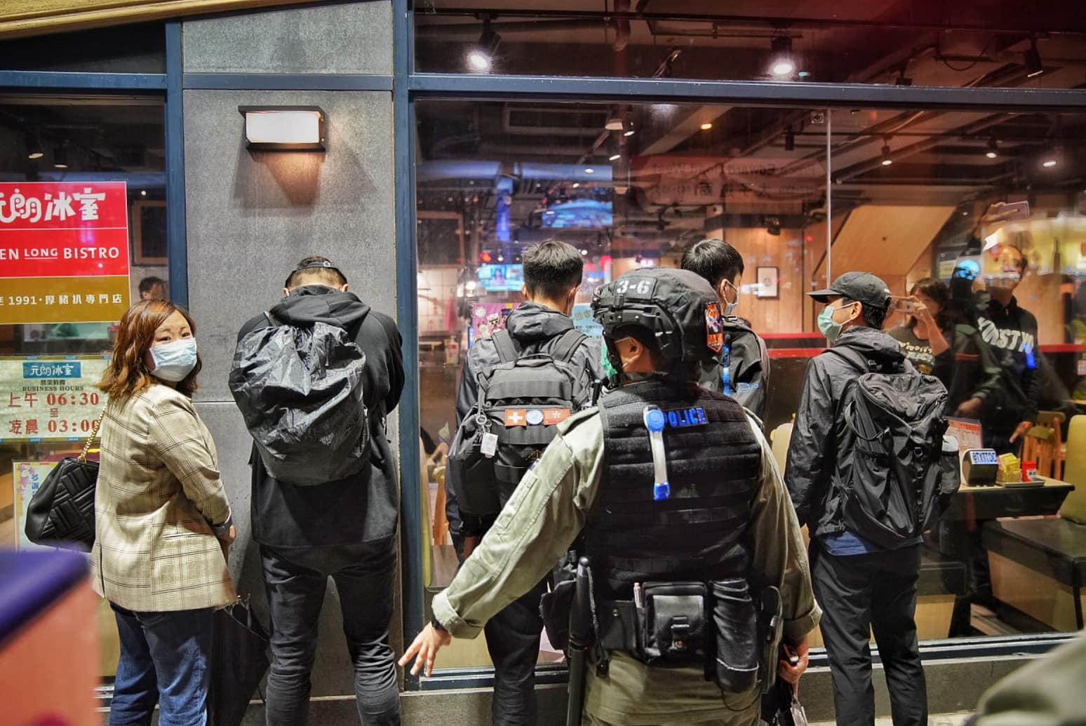 2020年3月31日為太子站襲擊事件7個月